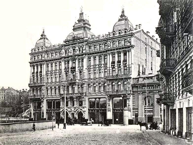 Київський Париж або Будинок Гінзбурга